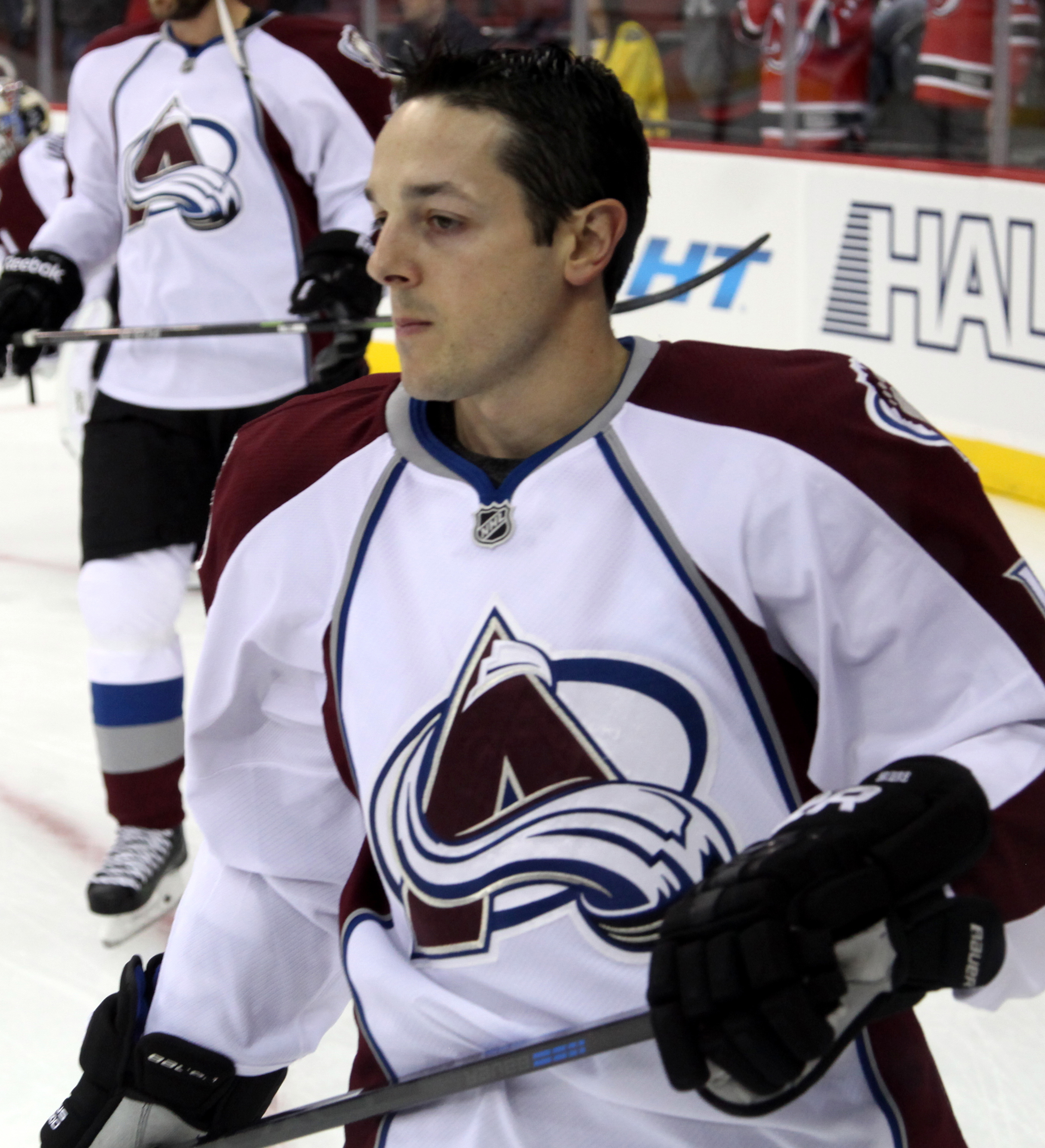 Briere in November 2014.